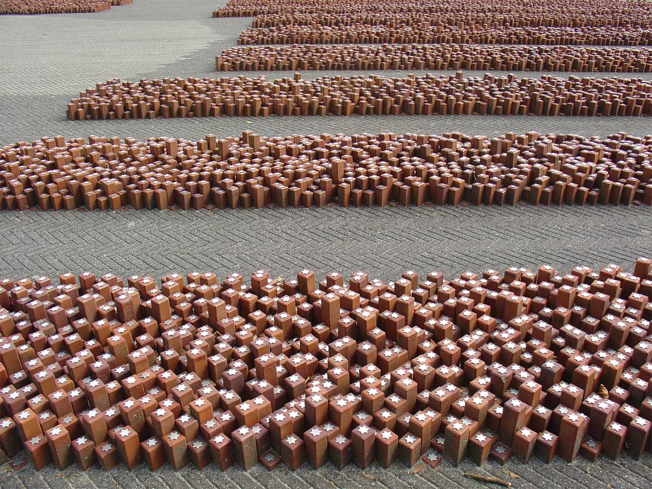 Monument appelplaats Kamp Westerbork